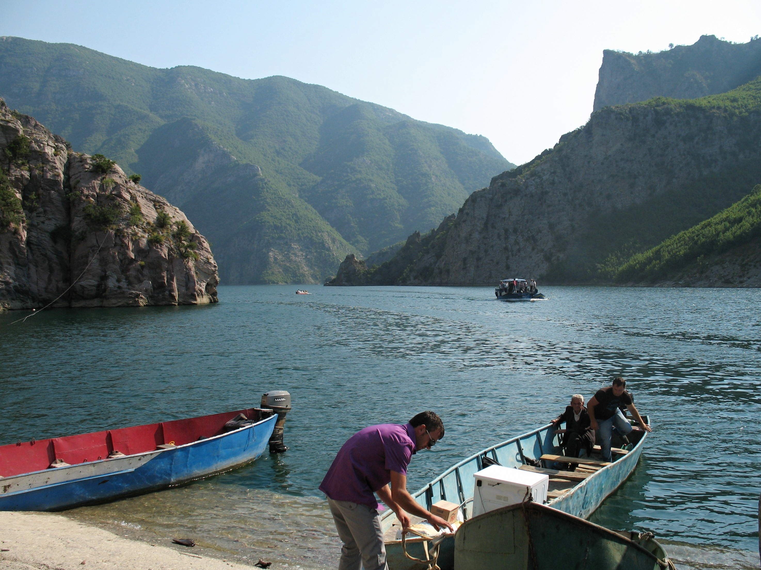 V přístavu Koman